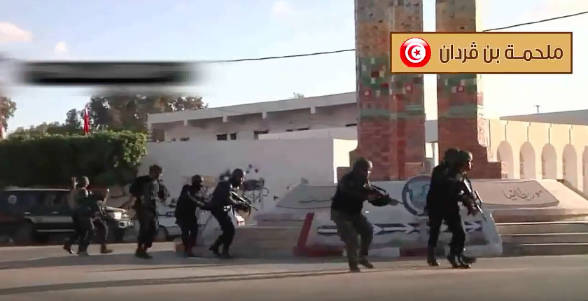 Attaque-Bataille de Ben Gardane (Tunisie), 7-10 mars 2016.